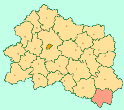 Orel Oblast map by Al Silonov Карта районов Орловской области